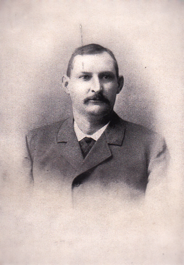 Adolf Heitmann, Herausgeber des Buchs "Vermächtnis eines armen Mädchens", Pseudonym: Ernst Volksmann